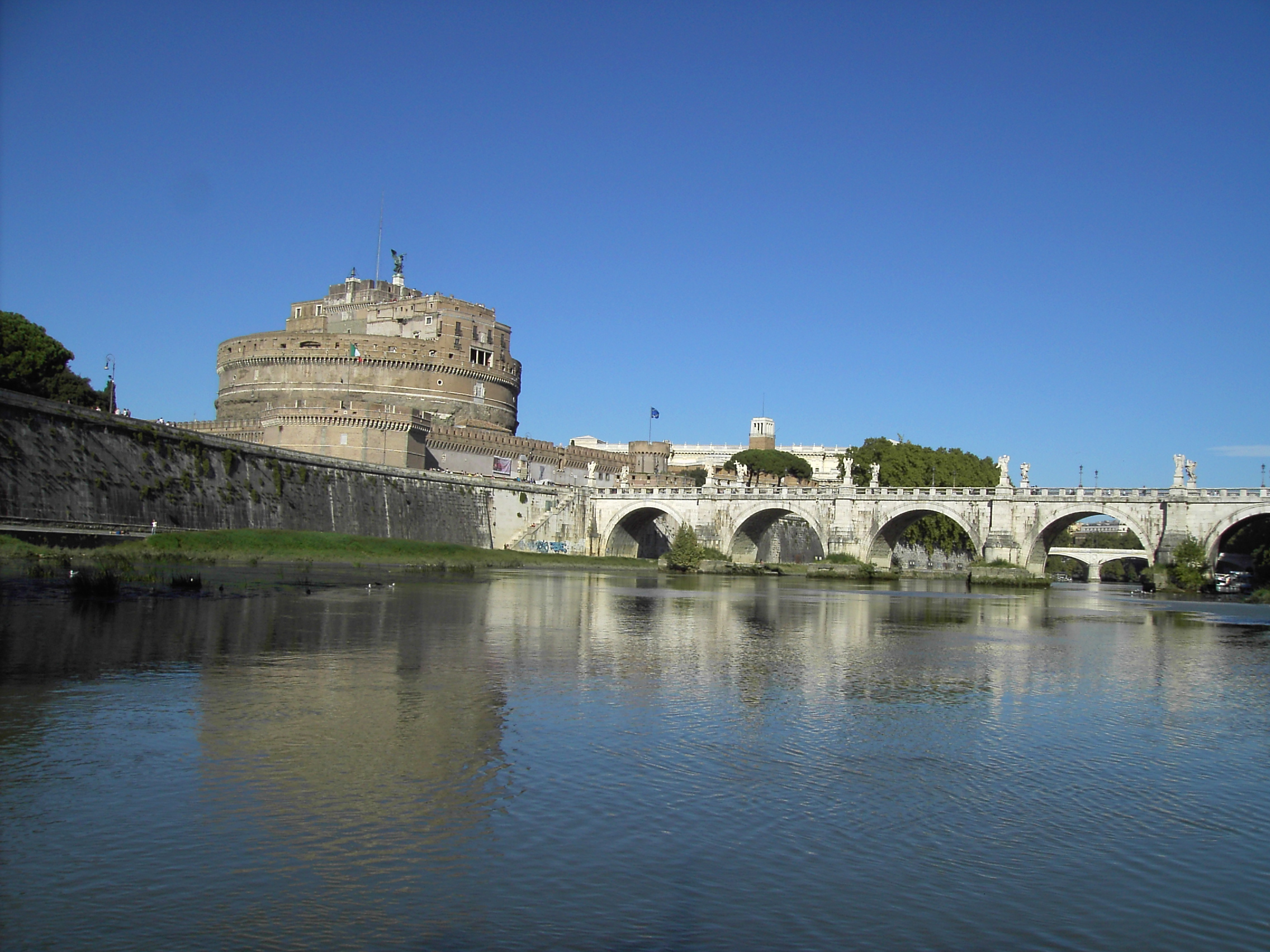 Roma , Tevere sotto Castello e ponte sant'Angelo by Lalupa